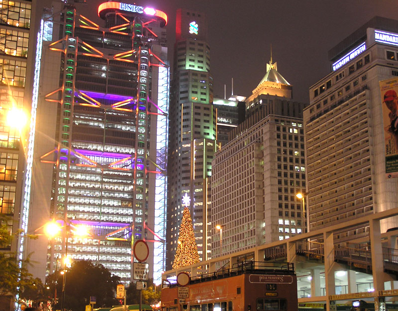 香港中環匯豐銀行大廈夜景 照片由Alan Mak於2004年12月拍攝